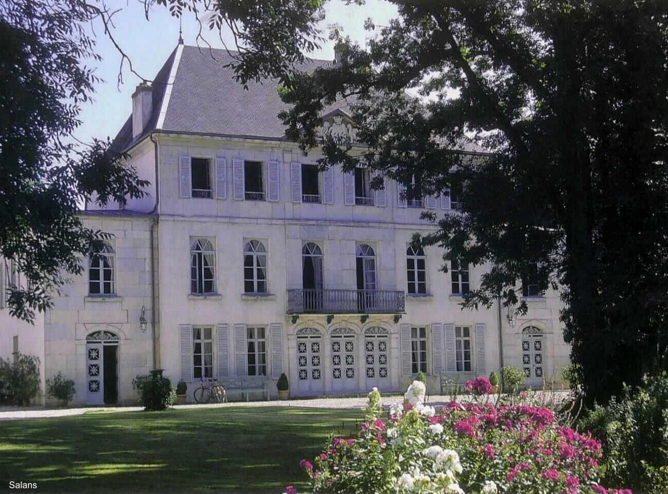 vue de face du chateau de salans (jura)